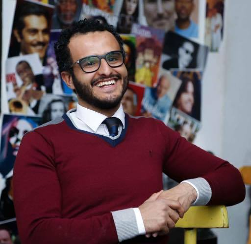 صورة صهيب شكري